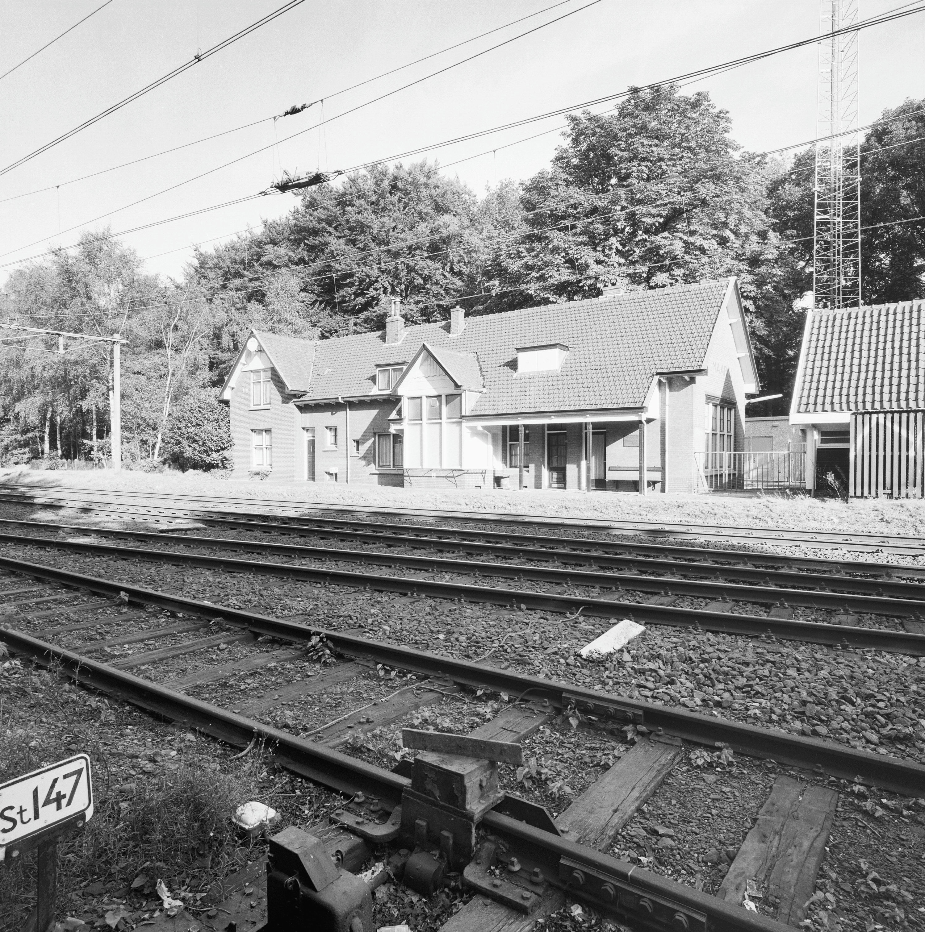 Ns Station: Perronzijde (opmerking: Gefotografeerd voor De Utrechtse Heuvelrug)